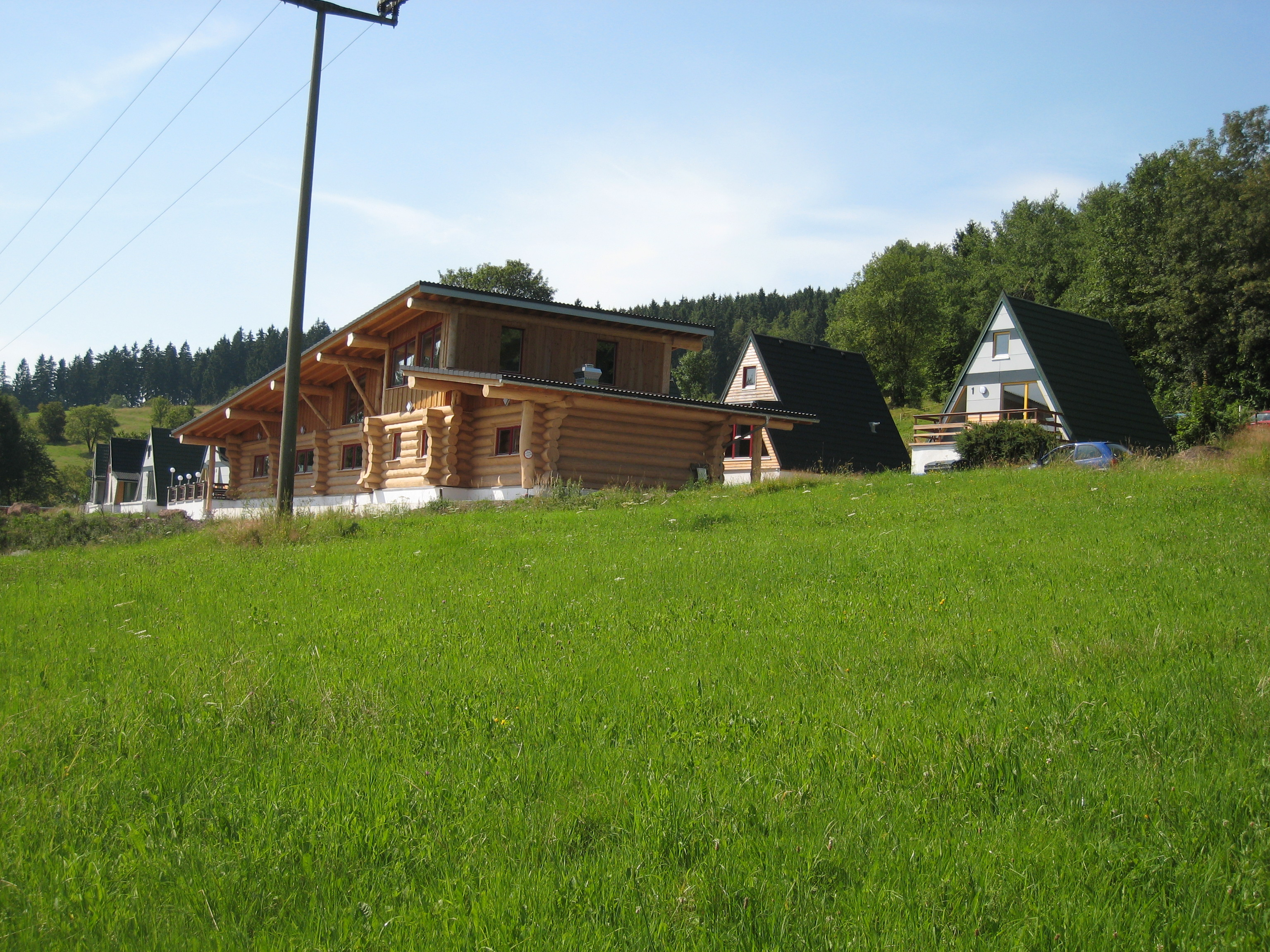 Event- und Tagungszentrum Miavojo in Oehrenstock, Langewiesen.